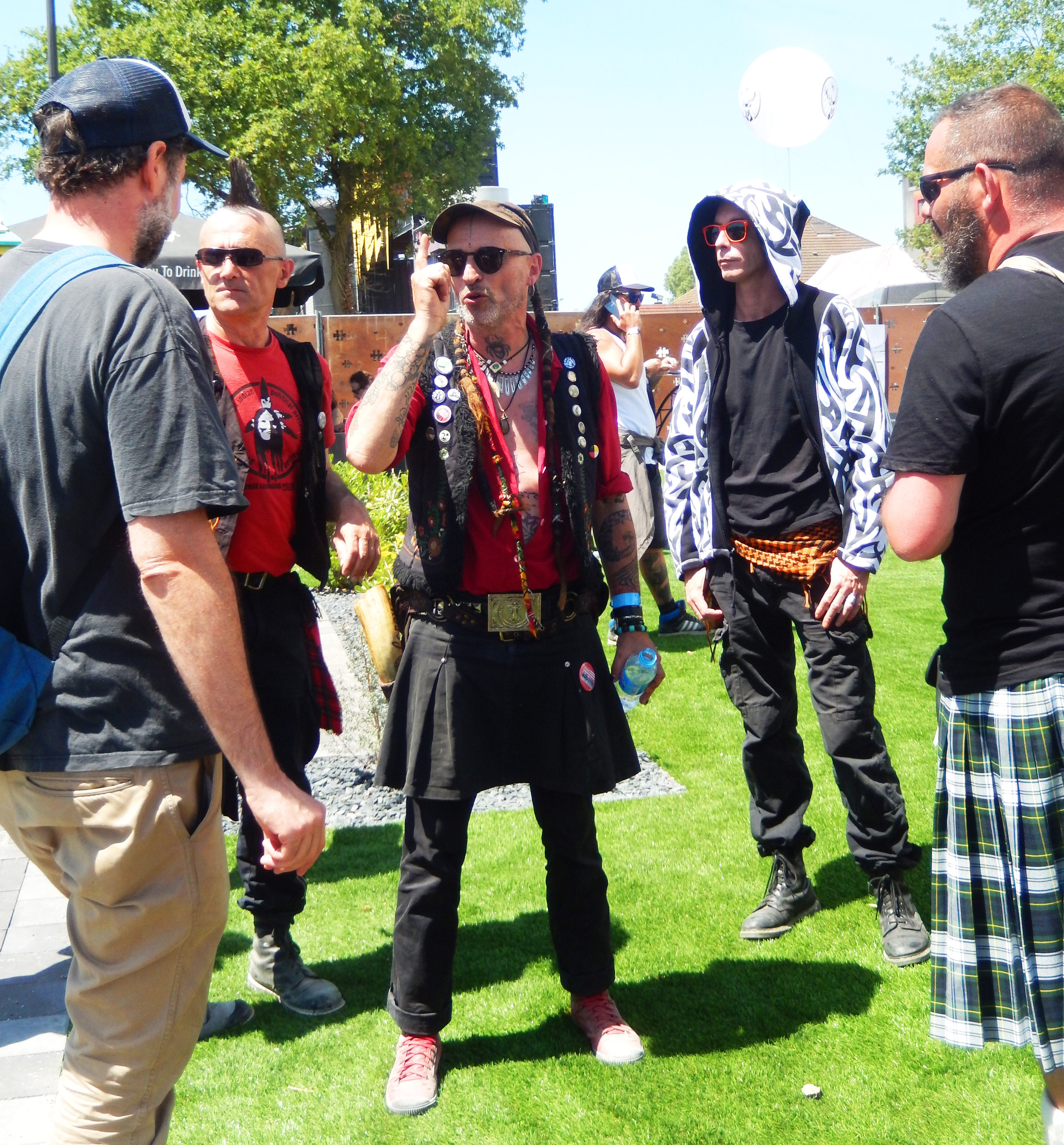 Les Ramoneurs de menhirs - Avant interview à l'espace VIP au Hellfest 2017